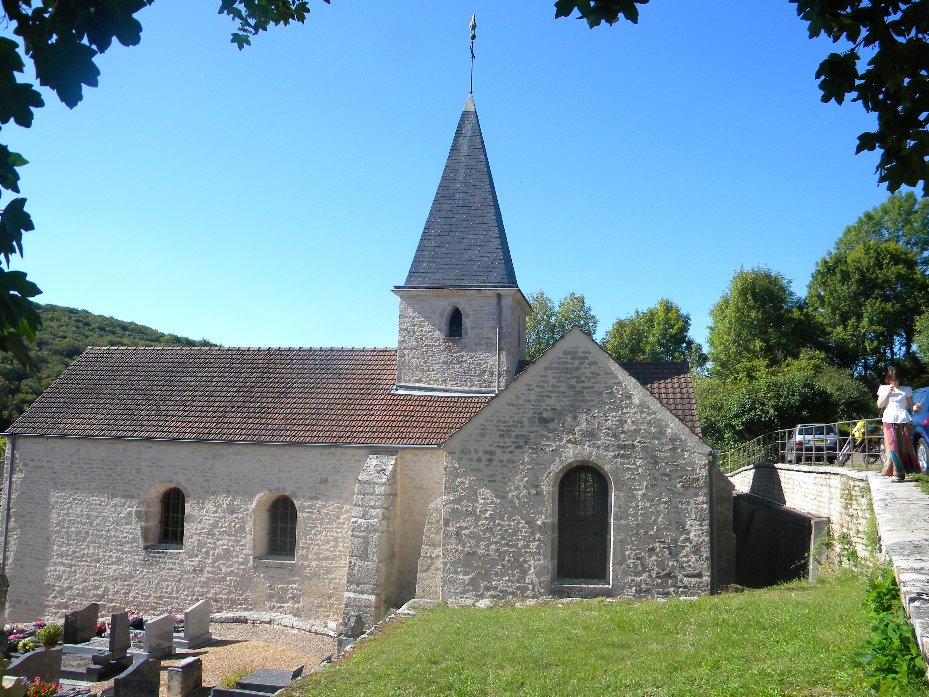 Eglise d'Aubaine